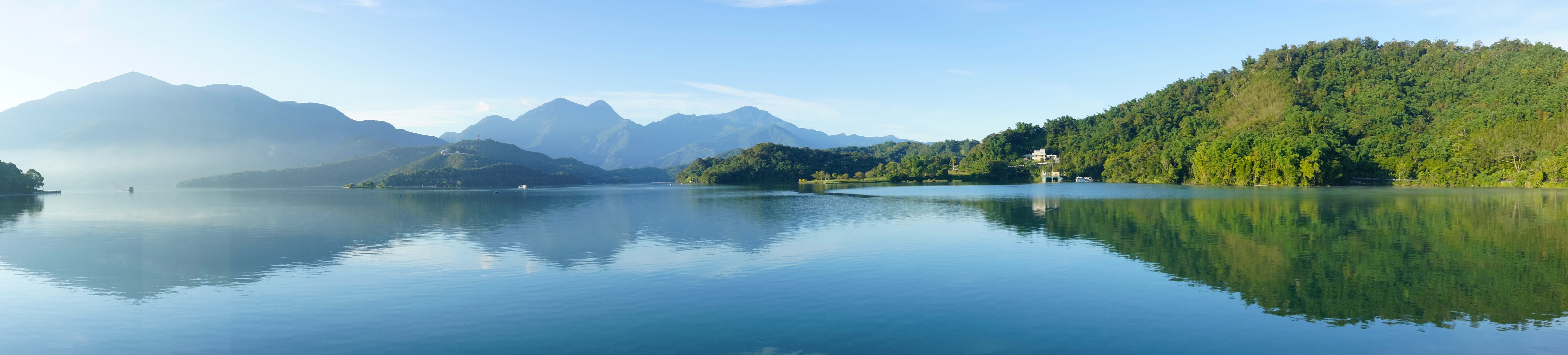 中文（台灣）: 晨間的日月潭